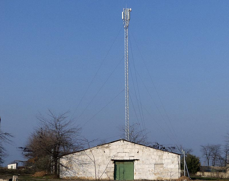 Базовая станция оператора Life:) село Кубанка (Одесская область)